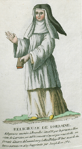 Collection de costumes de tous les ordres monastiques, supprimés à differentes époques, dans la ci-devant Belgique, Bruxelles, Philippe Joseph Maillart et sœur, 1811